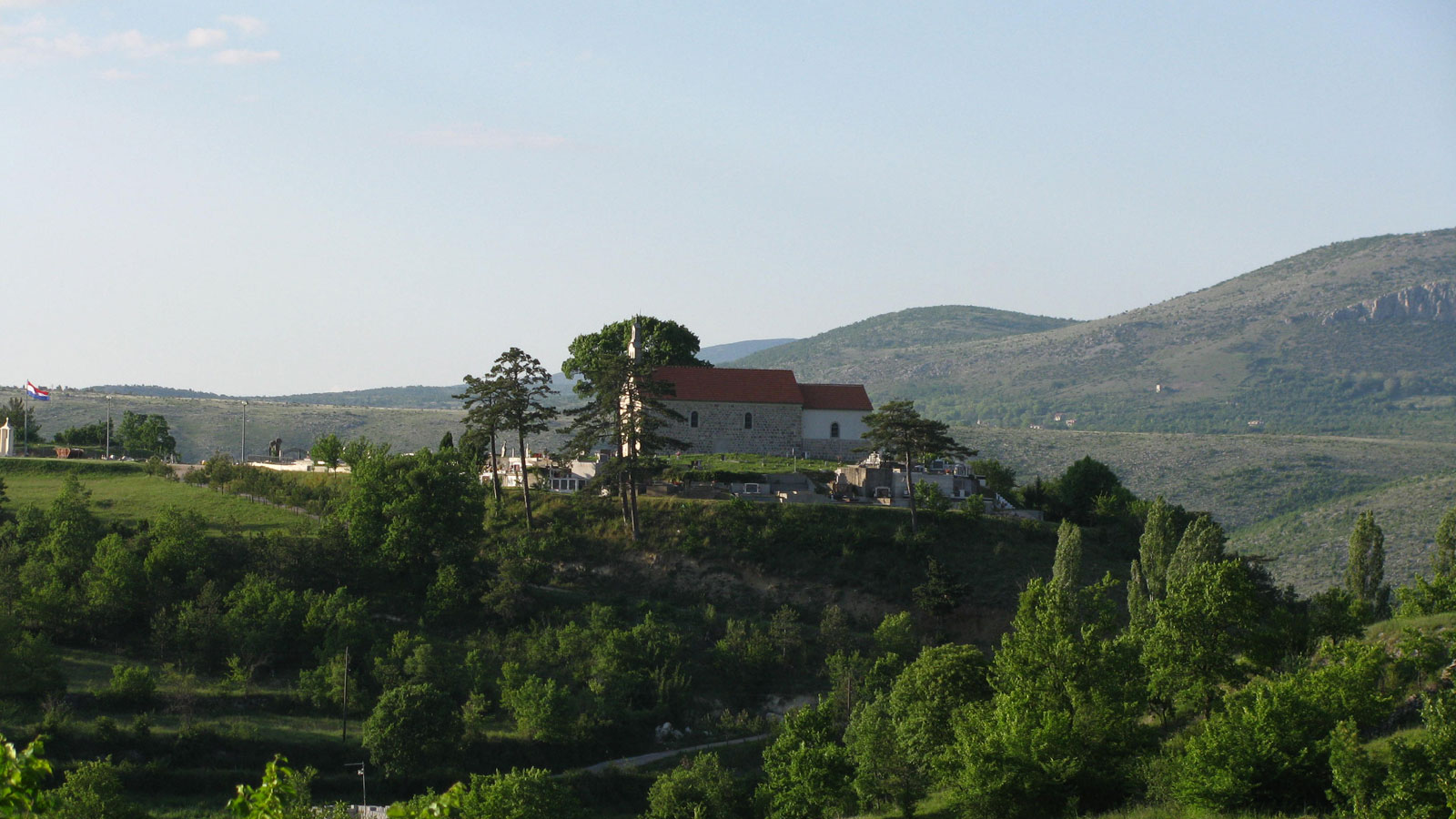 Crkva u Kljacima, pogled s juga